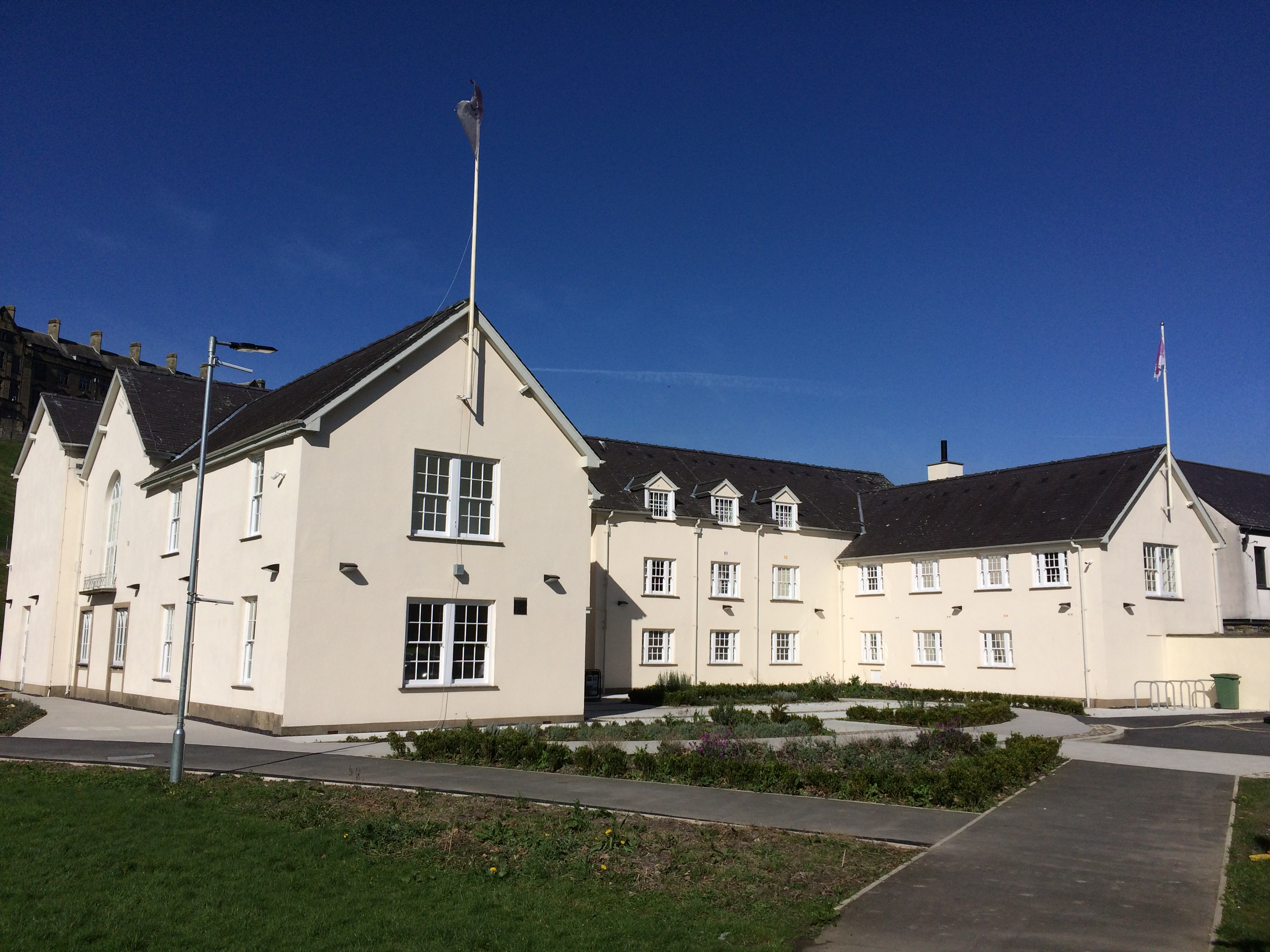 Plas yr Esgob, Bangor Gwynedd. Cartref (2016) Amgueddfa Bangor (Storiel)